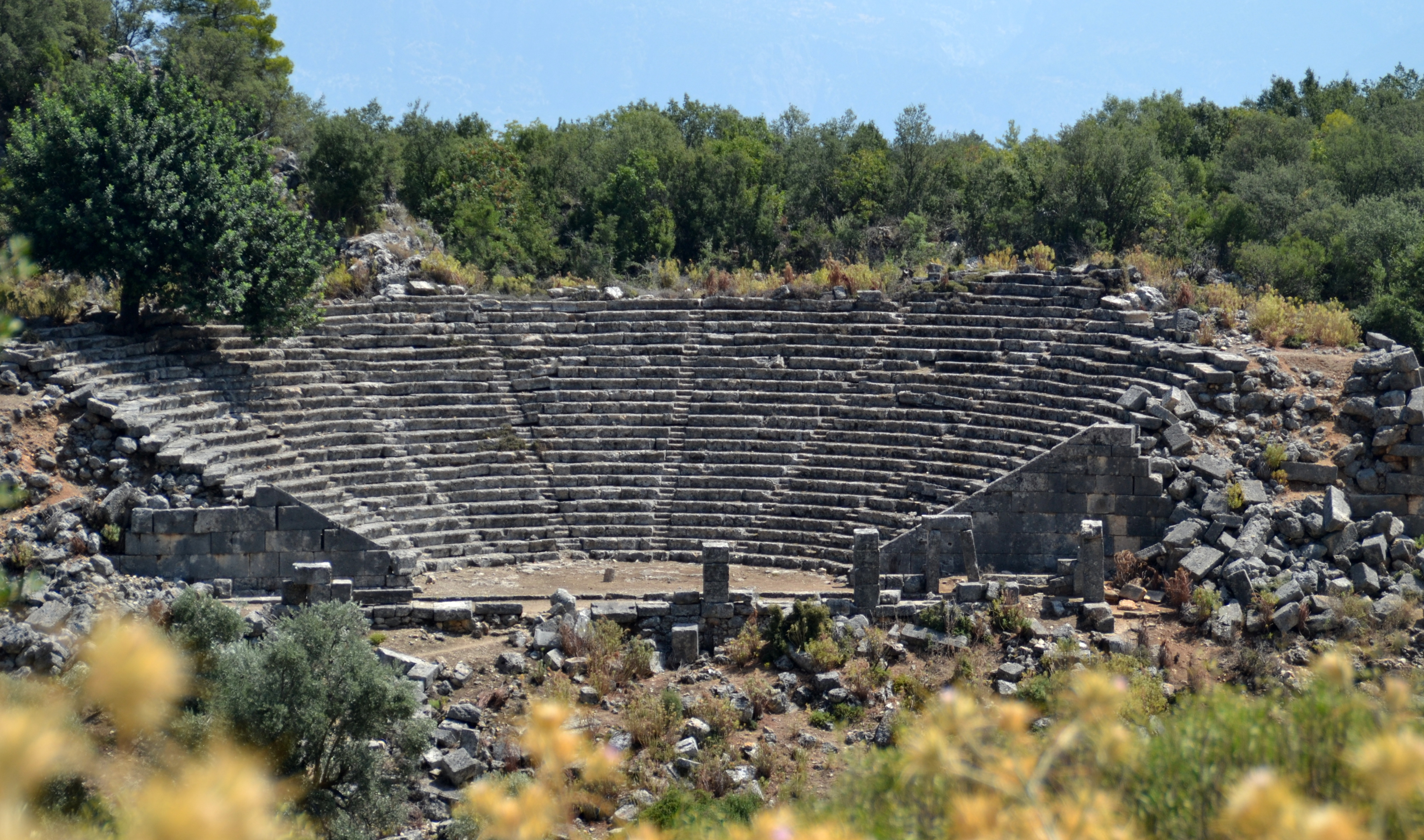 Amphiteater aus der Zeit des lykischen Bundes